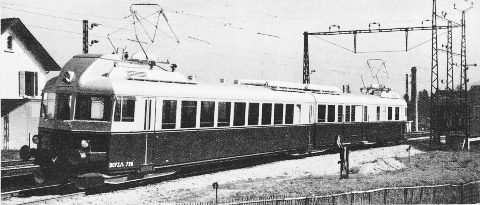 BLS-Leichttriebwagen BCFZe 4/6 736 im Bahnhof Versoix